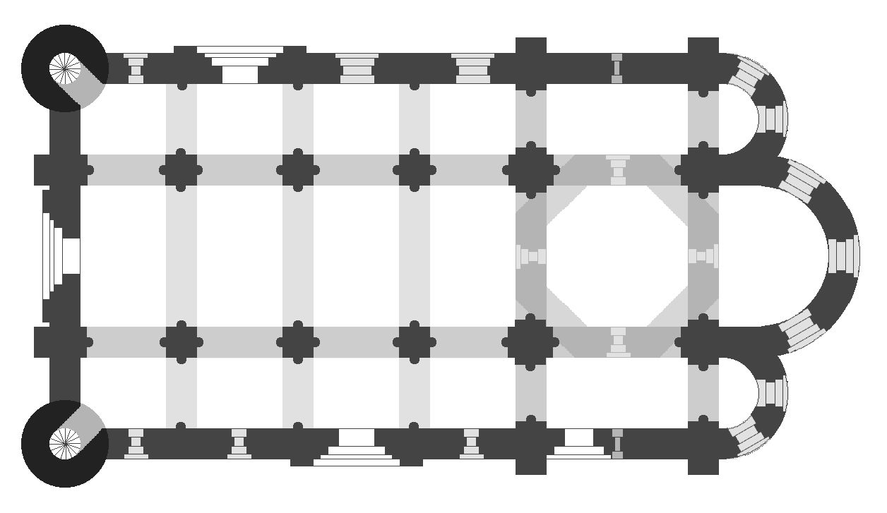 Planta de la iglesia de San Martín de Fromista, Palencia (España). es una iglesia hispana del Camino de Santiago, promovida por la reina de Navarra, doña Mayor, año 1066 Romanesque architecture